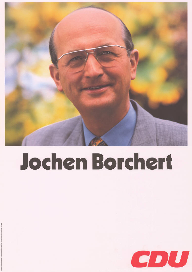 Jochen Borchert CDU Abbildung: Porträtfoto Plakatart: Kandidaten-/Personenplakat mit Porträt Auftraggeber: CDU-Bundesgeschäftsstelle, Hauptabteilung Öffentlichkeitsarbeit, Konrad-Adenauer-Haus, Bonn Drucker_Druckart_Druckort: Greven & Bechtold GmbH Objekt-Signatur: 10-031 : 878 Bestand: CDU-Plakate (10-031) GliederungBestand10-18: Personenplakate Lizenz: KAS/ACDP 10-031 : 878 CC-BY-SA 3.0 DE